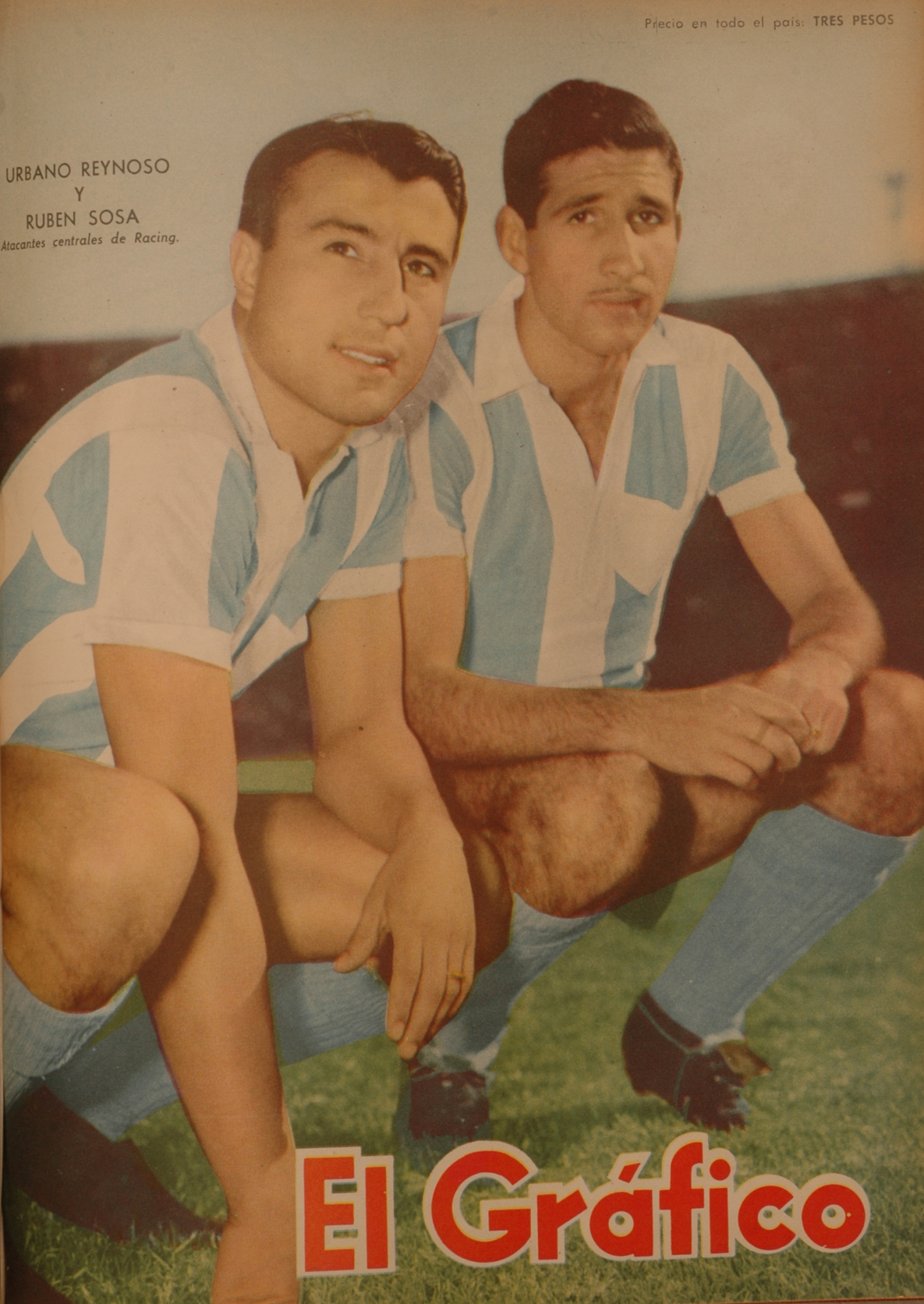 El Grafico del 30 de Mayo de 1958. Edicion 2020